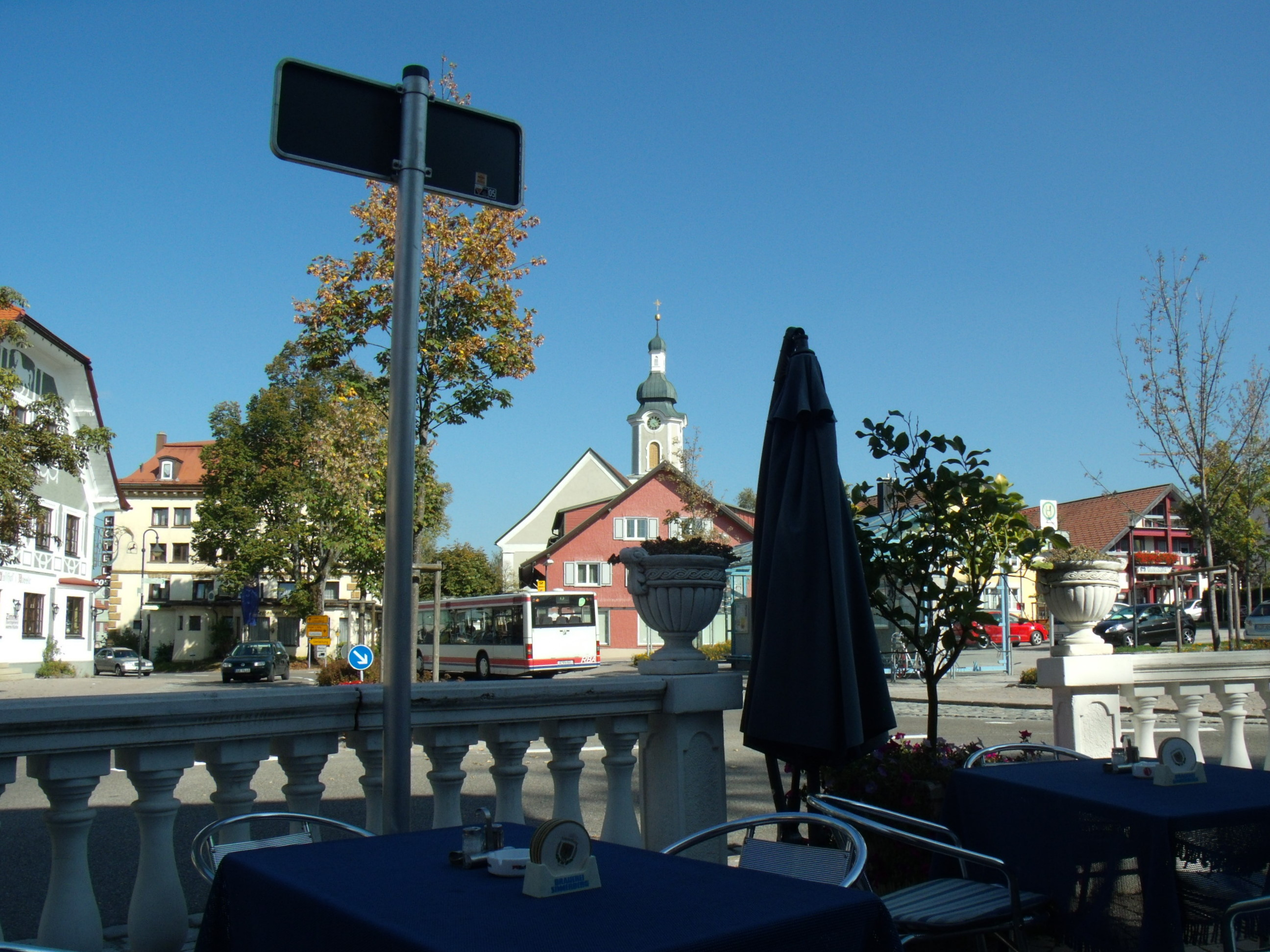 Scheidegg